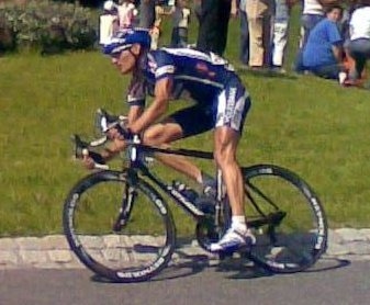 Mariusz Witecki auf der 4. Etappe der Deutschland Tour 2007, Scheidegg